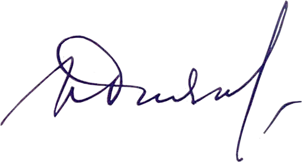 Роспись Киевского городского головы Ипполита Дьякова